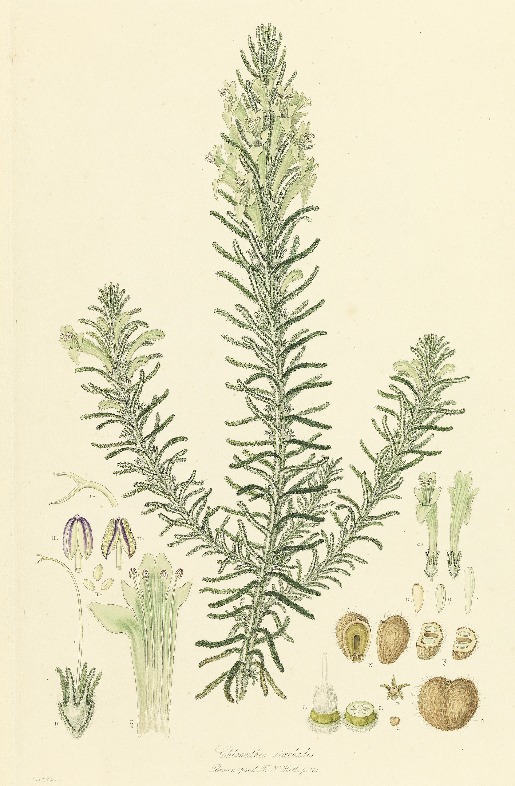 Chloanthes stoechadis en Ferdinand Bauer, Illustrationes florae Novae Hollandiae, sive, Icones generum quae in Prodromo florae Novae Hollandiae et Insulae Van Diemen descripsit Robertus Brown, London, 1813 - a1: flor, vistas sublaterales, D: cáliz, E: corola abierta, I: estilo con estigma bífido, I1: ovario, I2: idem, corte transversal, H1: tecas de los estambres (inmaduras y maduras), H2: polen, m: fruto con el cáliz persistente, N: fruto binucular, mericarpos sueltos y mericarpos en corte transversal, O: semillas, P: embrion.